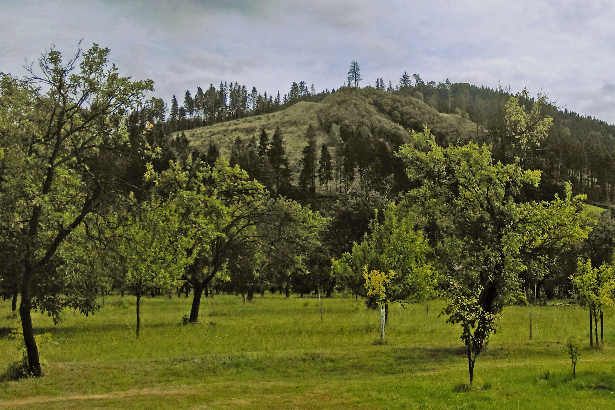 Hrádek Zubříč (Nový Šaumburk), nad vsí, Podhradní Lhota.